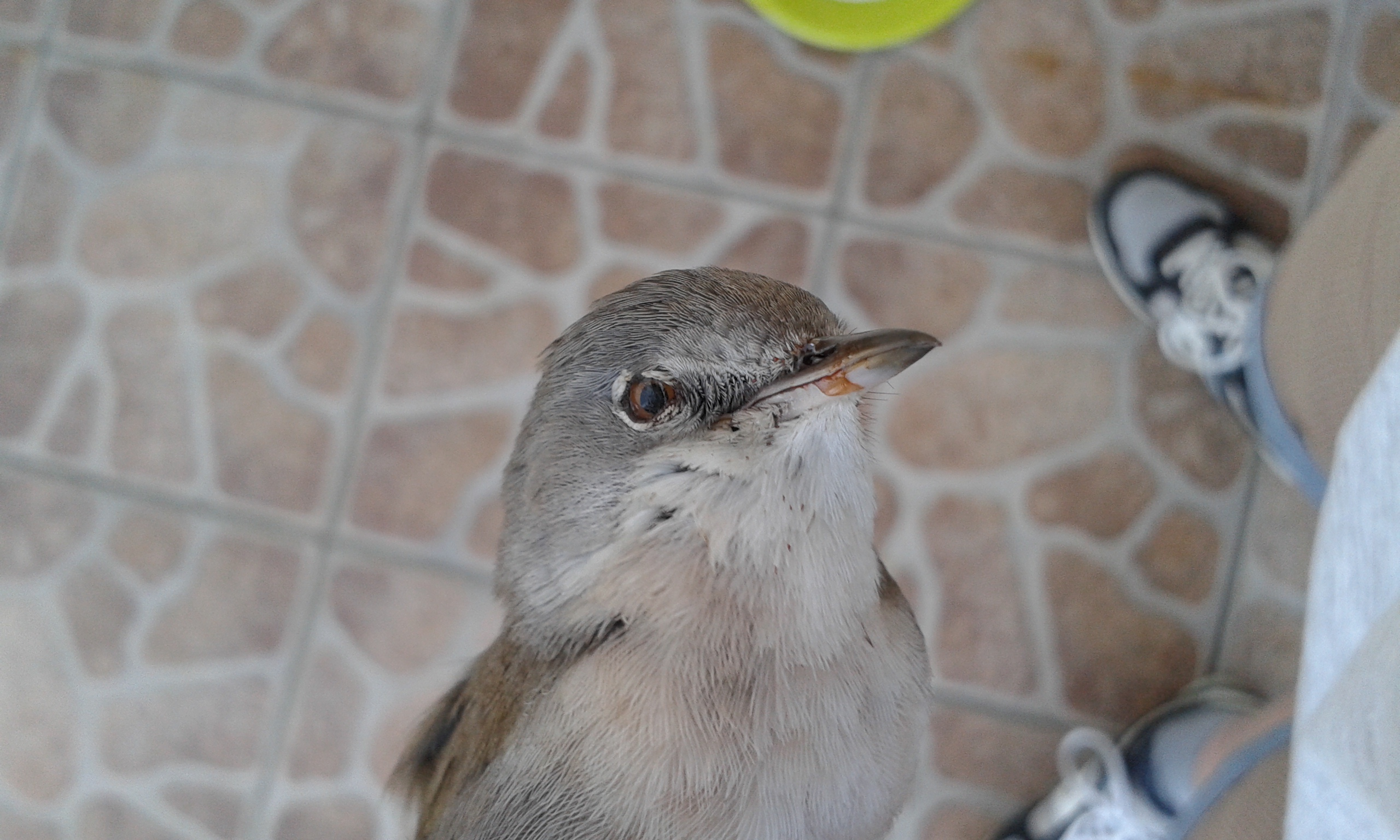 Pokrzewka cierniówka potrącona przez samochód.